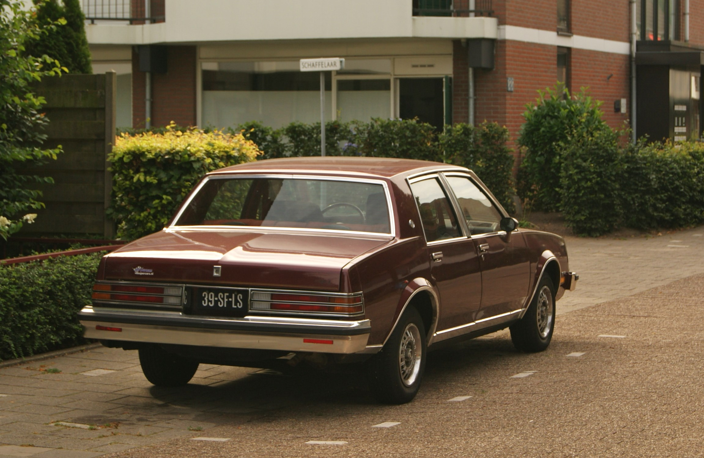 39-SF-LS